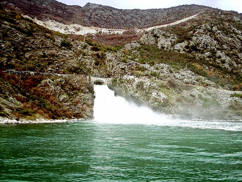 Karstquelle Sopot